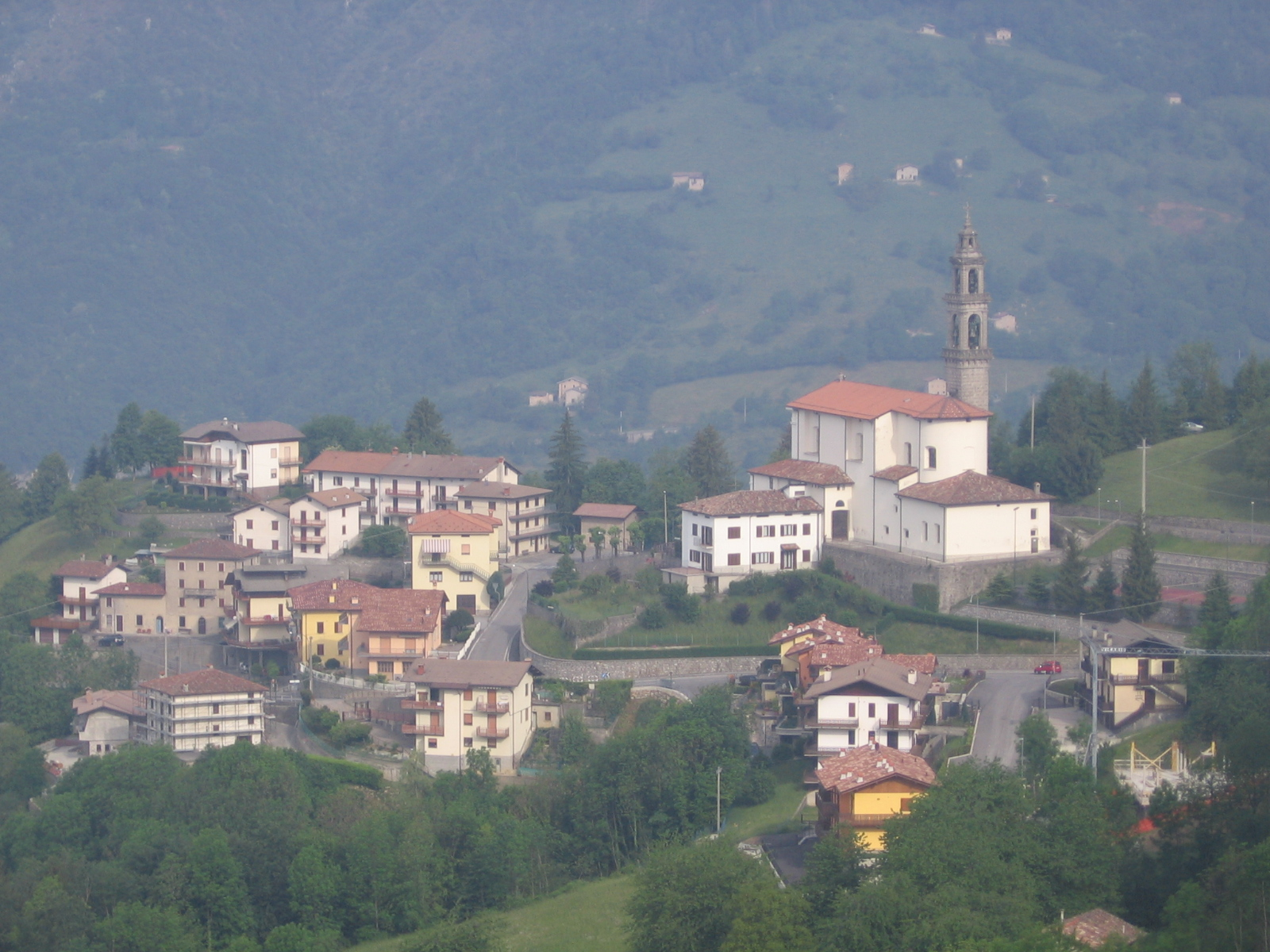 Costa Serina, Bergamo, Italia